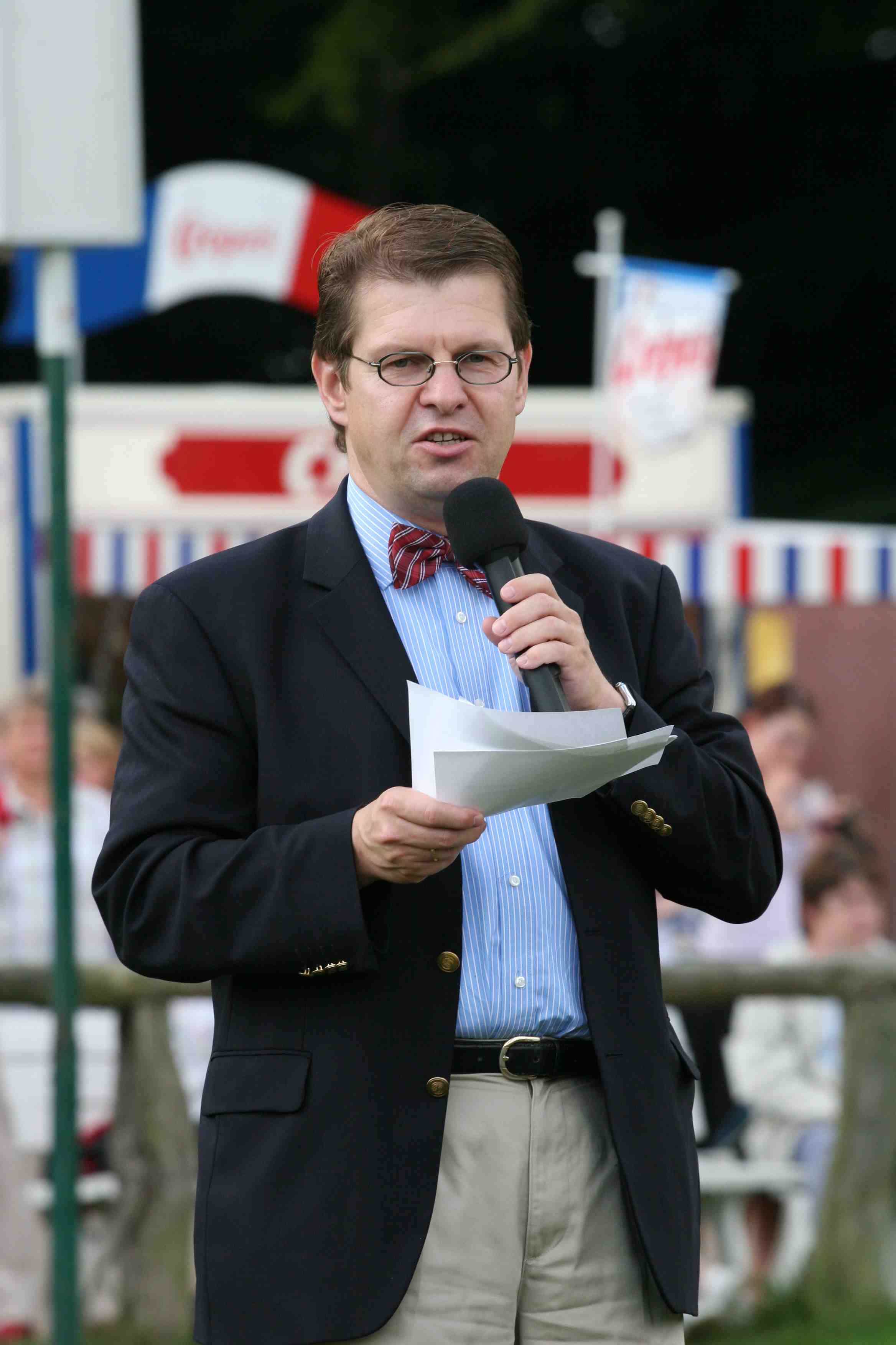 Ralf Stegner als Innenminister von Schleswig-Holstein bei der Eröffnung des Landesbreitensportturniers am 20.08.2006 in Bad Segeberg